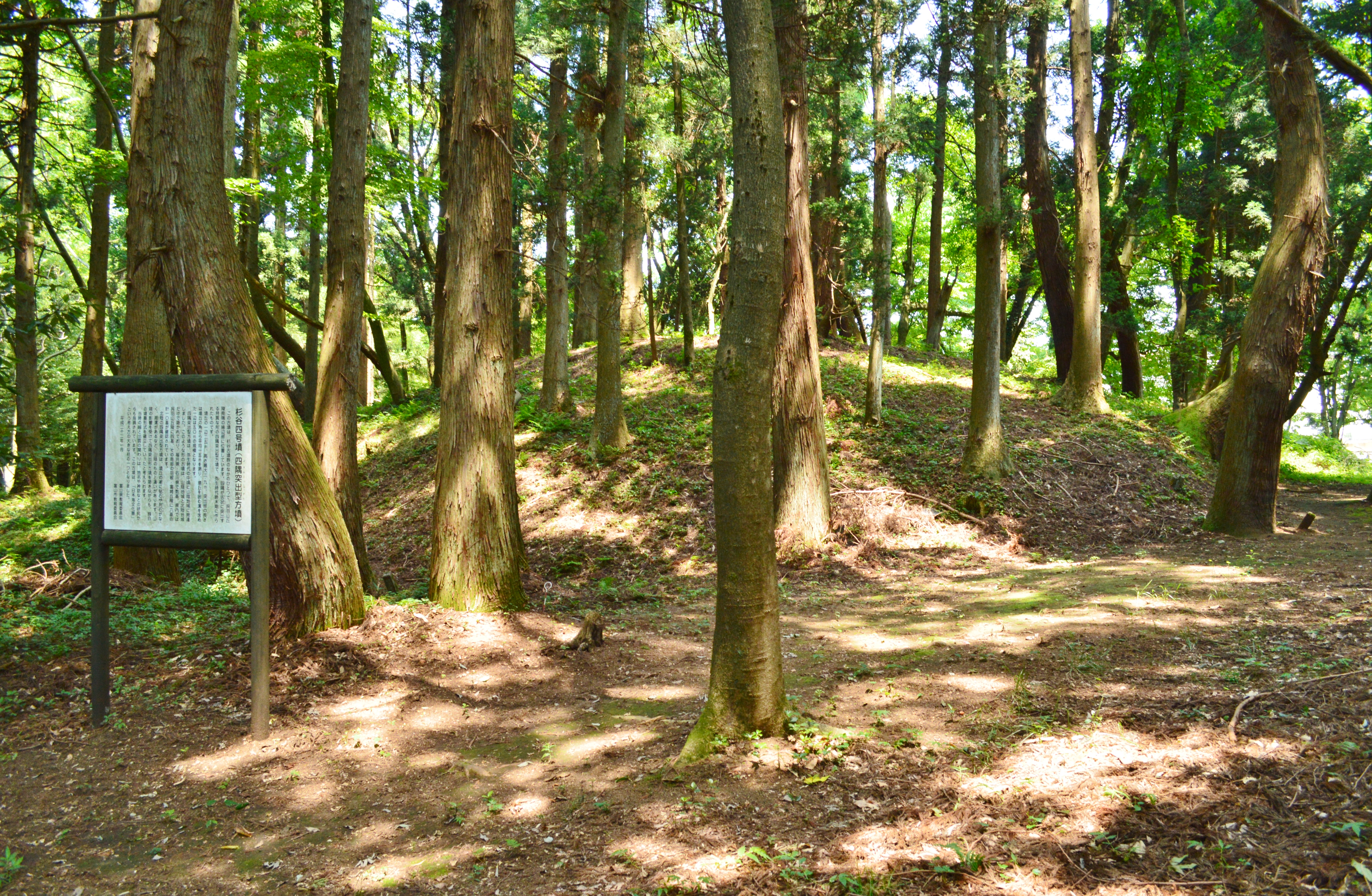 杉谷4号墳 墳丘 Nikon D3200